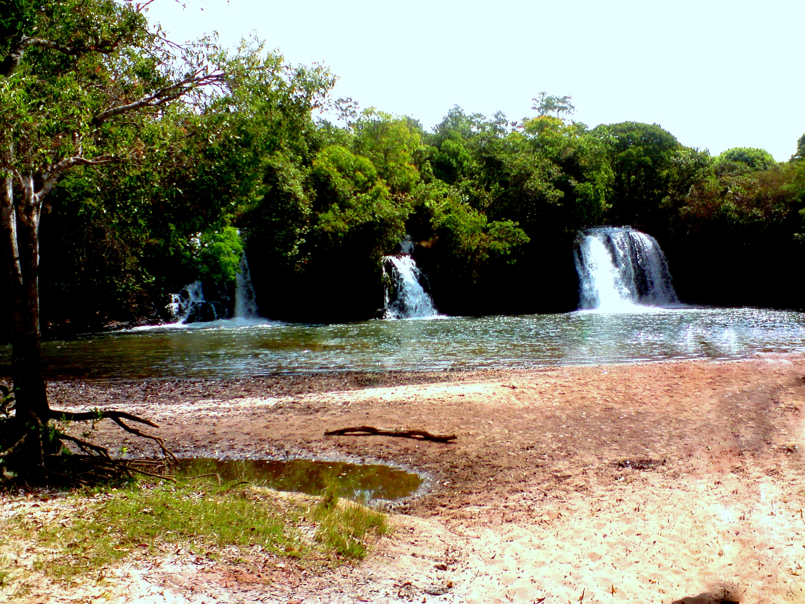 Três Cachoeiras